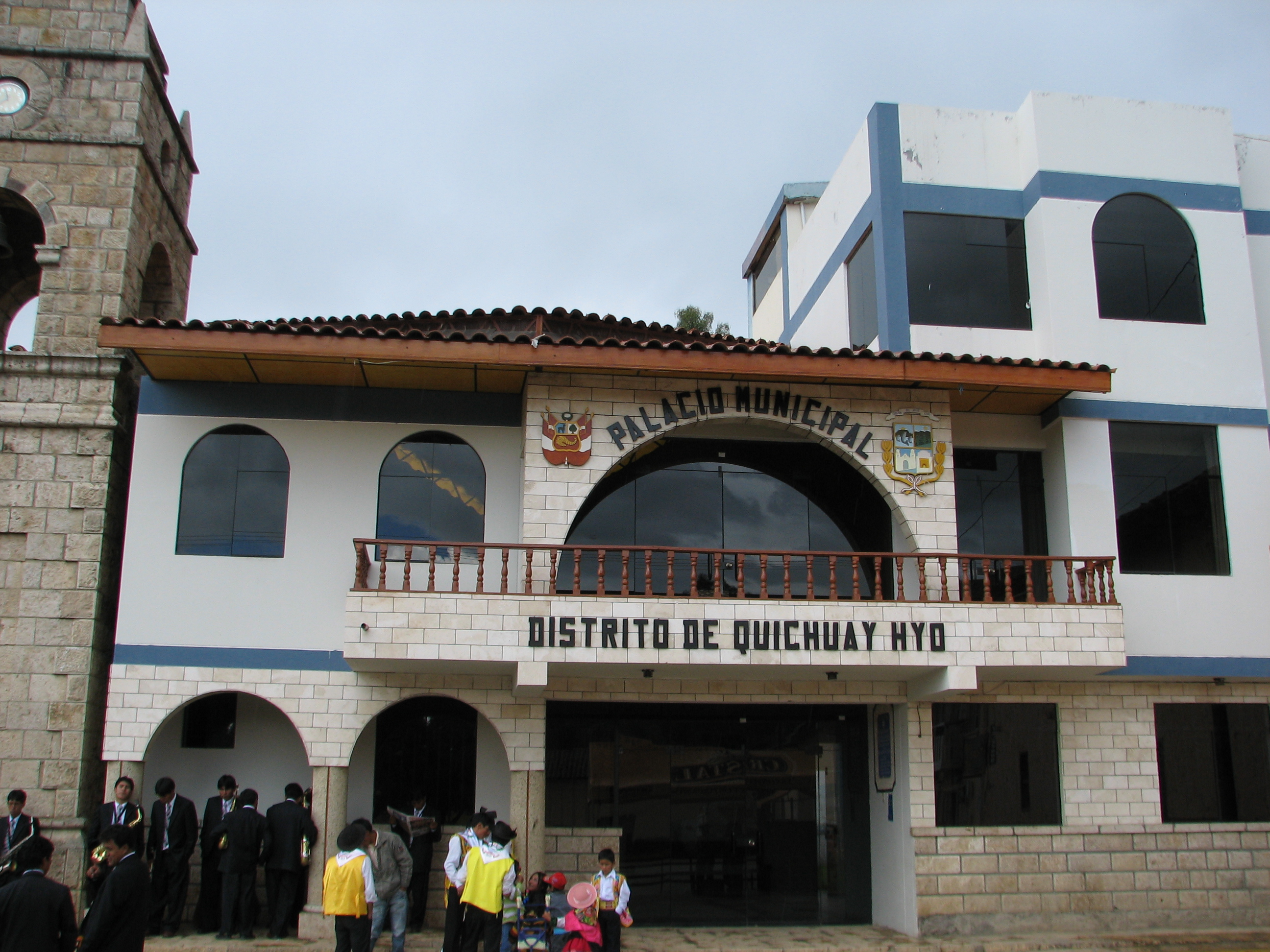 Municipalidad, Quichuay/Huancayo/Junín, Peru.jpg